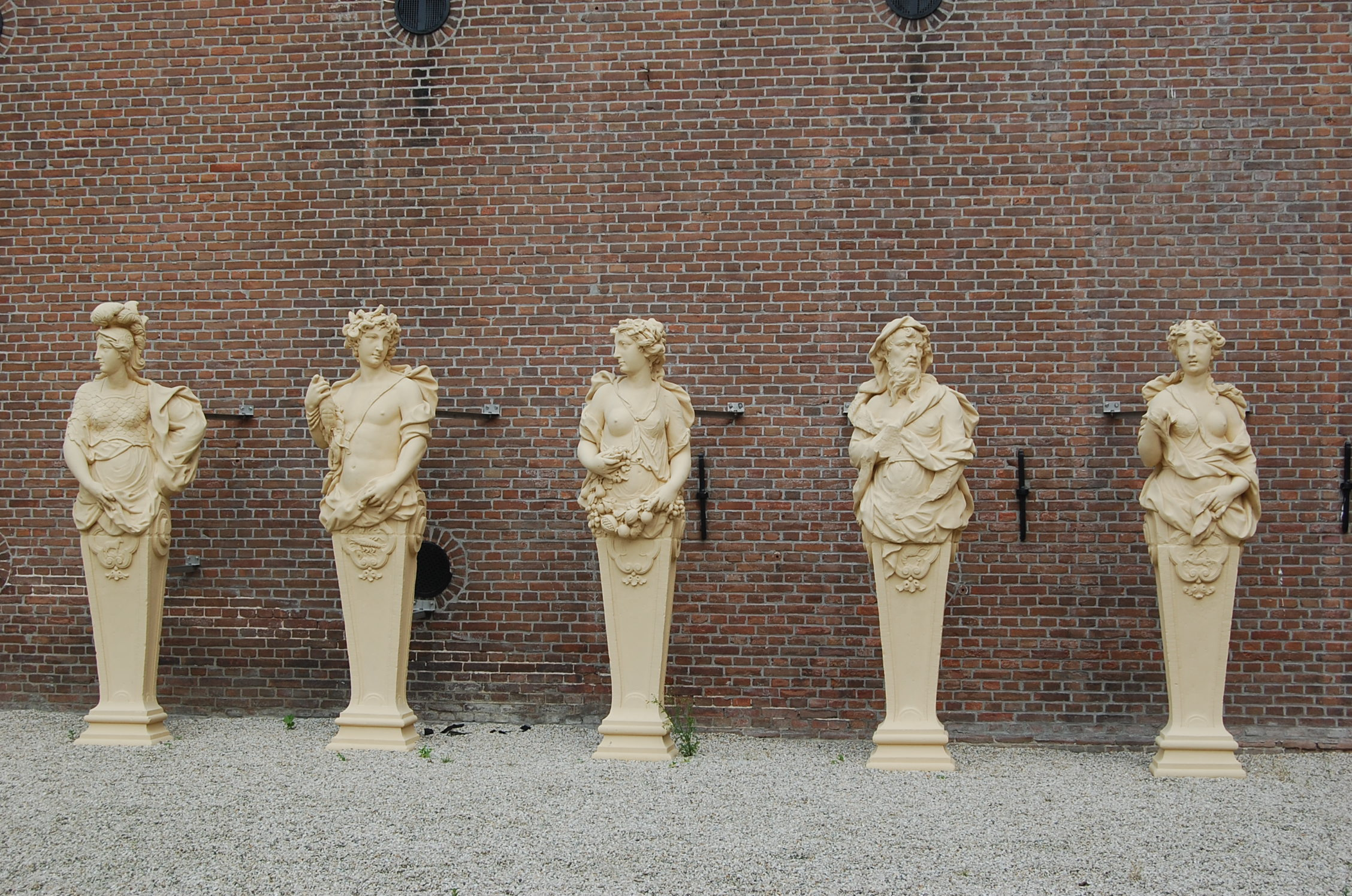 De vijf beelden in de tuin van Keramiekmuseum Princessehof.